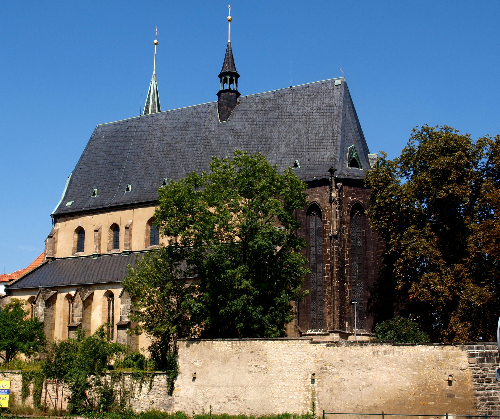 Slaný, Kostel sv. Gotharda